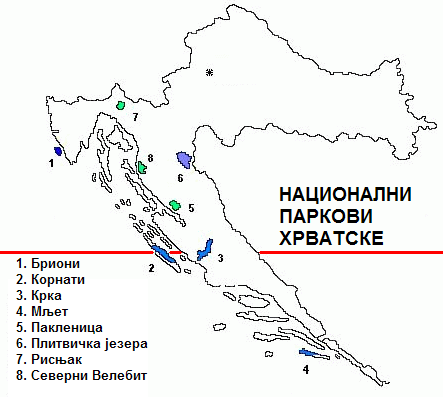 Национални паркови у Хрватској. Превод мапе File:Parki Narodowe w Chorwacji-mapa.jpg.